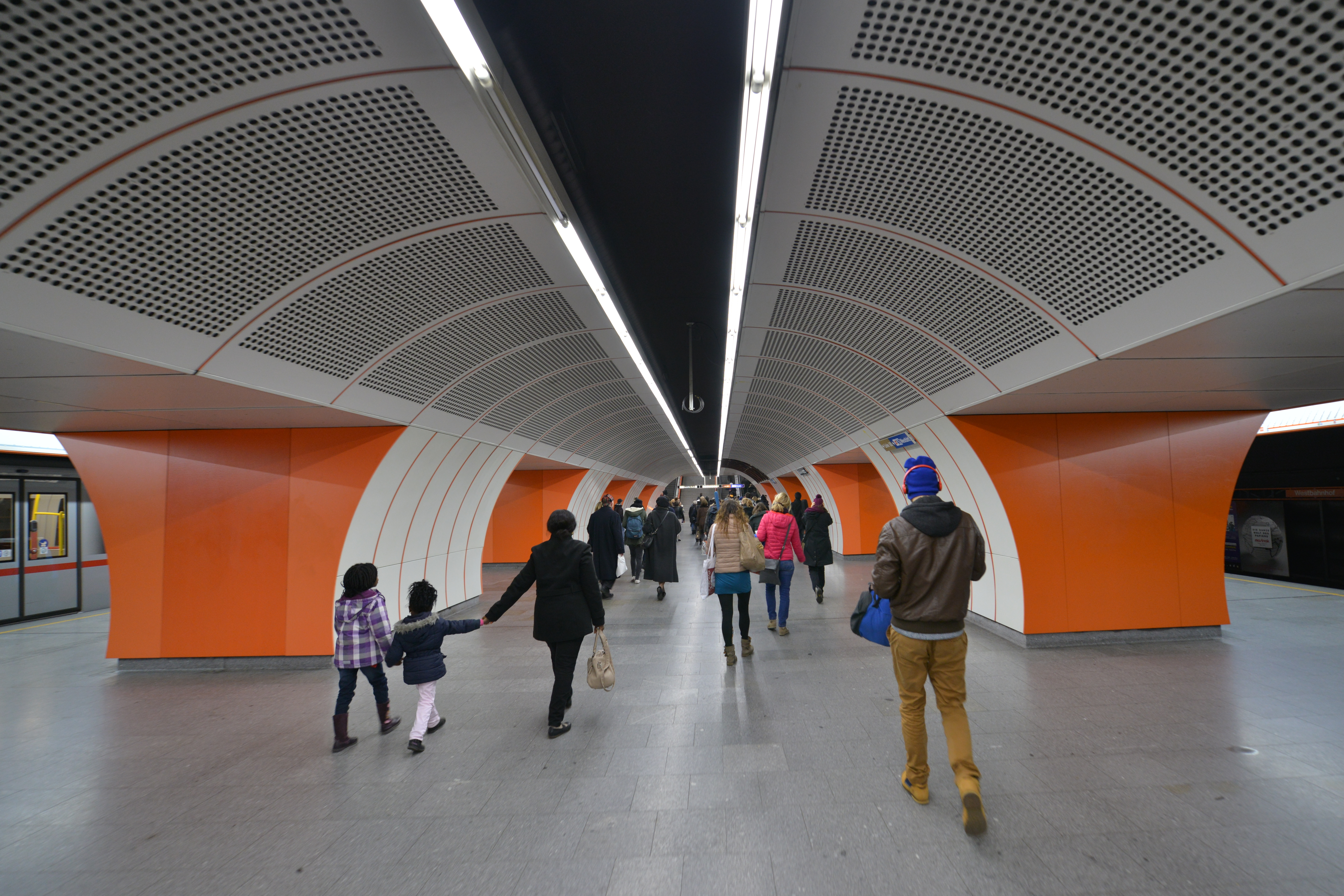 in der U-Bahn-Station Westbahnhof.